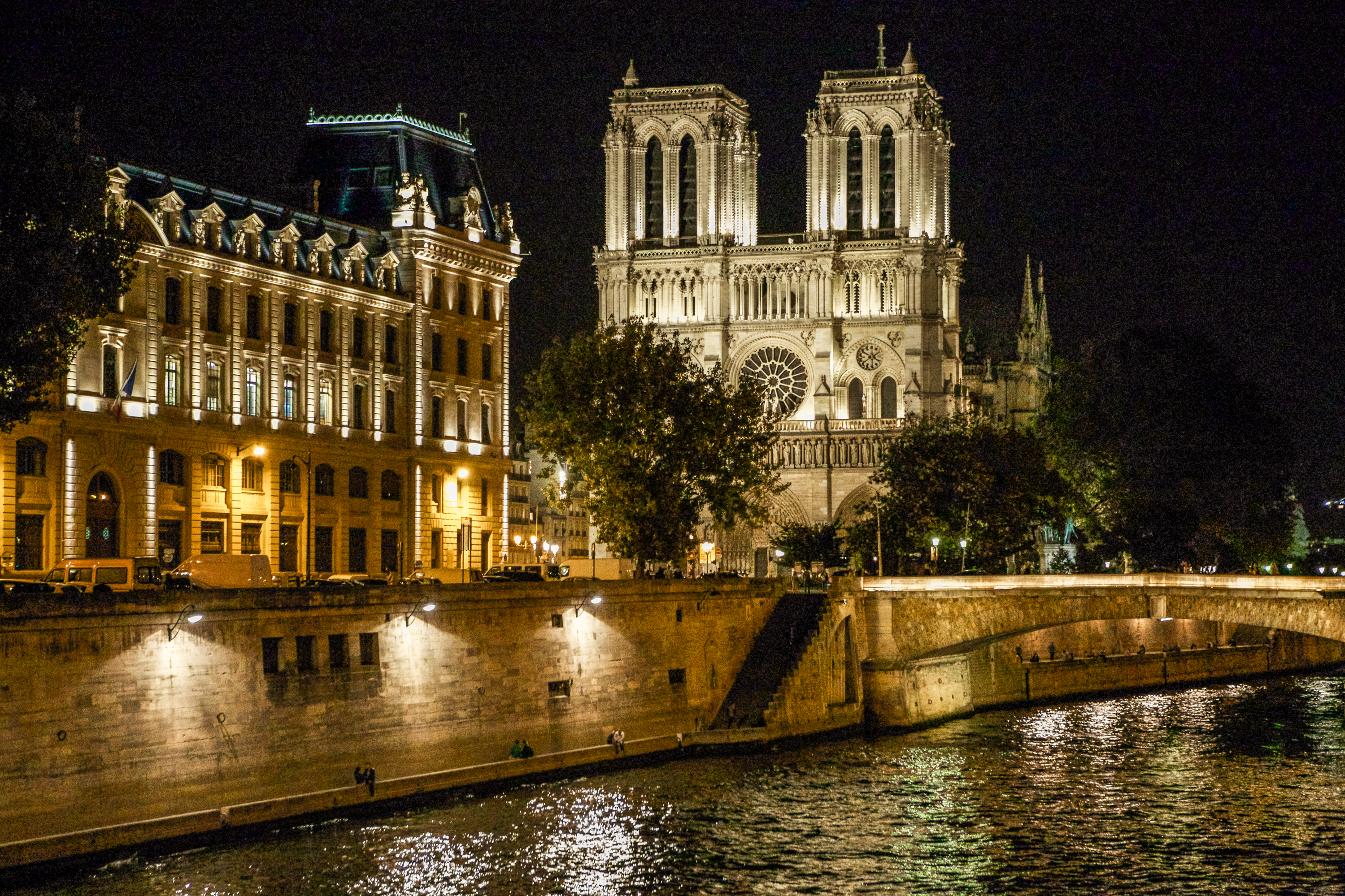 Préfecture de Police de Paris, Quai du Marché-Neuf, et Cathédrale Notre Dame de Paris, France